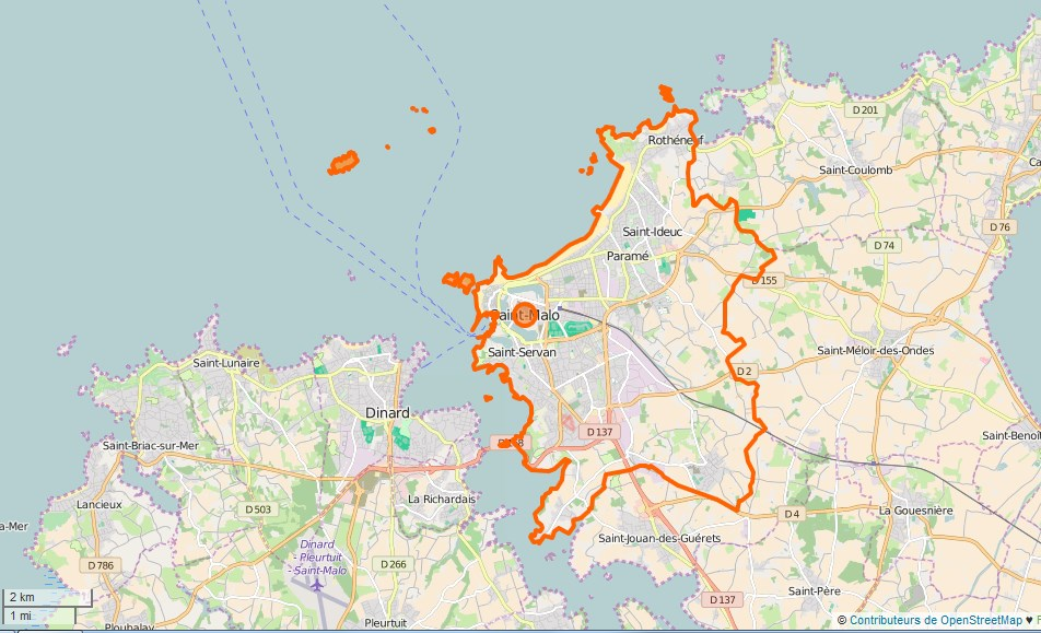 Saint-Malo Limite communale This map may be incomplete, and may contain errors. Don't rely solely on it for navigation.